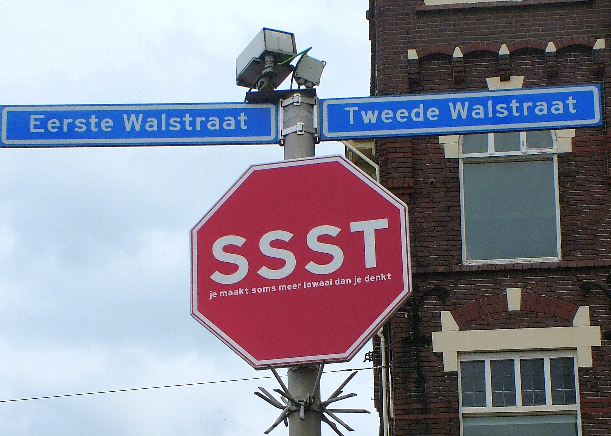 Nijmegen: "Ssst / je maakt soms meer lawaai dan je denkt" (Man macht manchmal mehr Lärm als man denkt). Ebenso wie die Kamera eine Reaktion auf die zunehmende "uitgaansgeweld" in den Niederlanden.